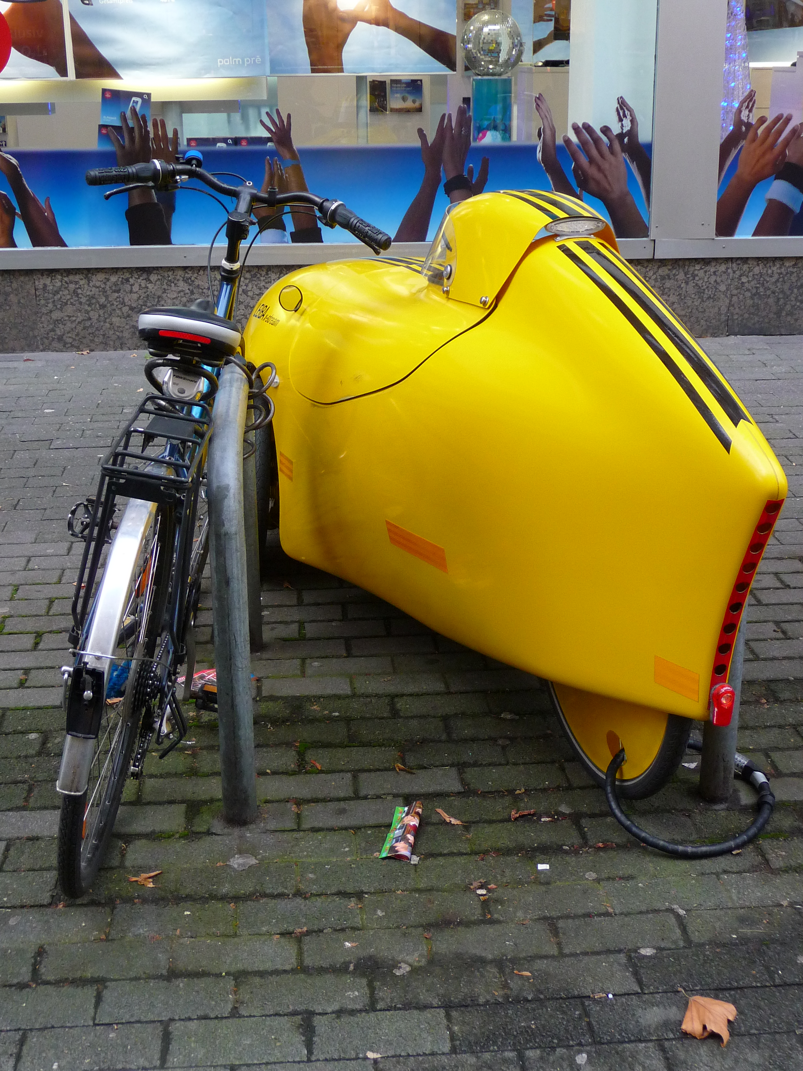 vollverkleidetes Liegedreirad (Velomobil) der Firma Velomobilwerk in Erding (Bayern, Deutschland); hier das Modell Leiba x-treme